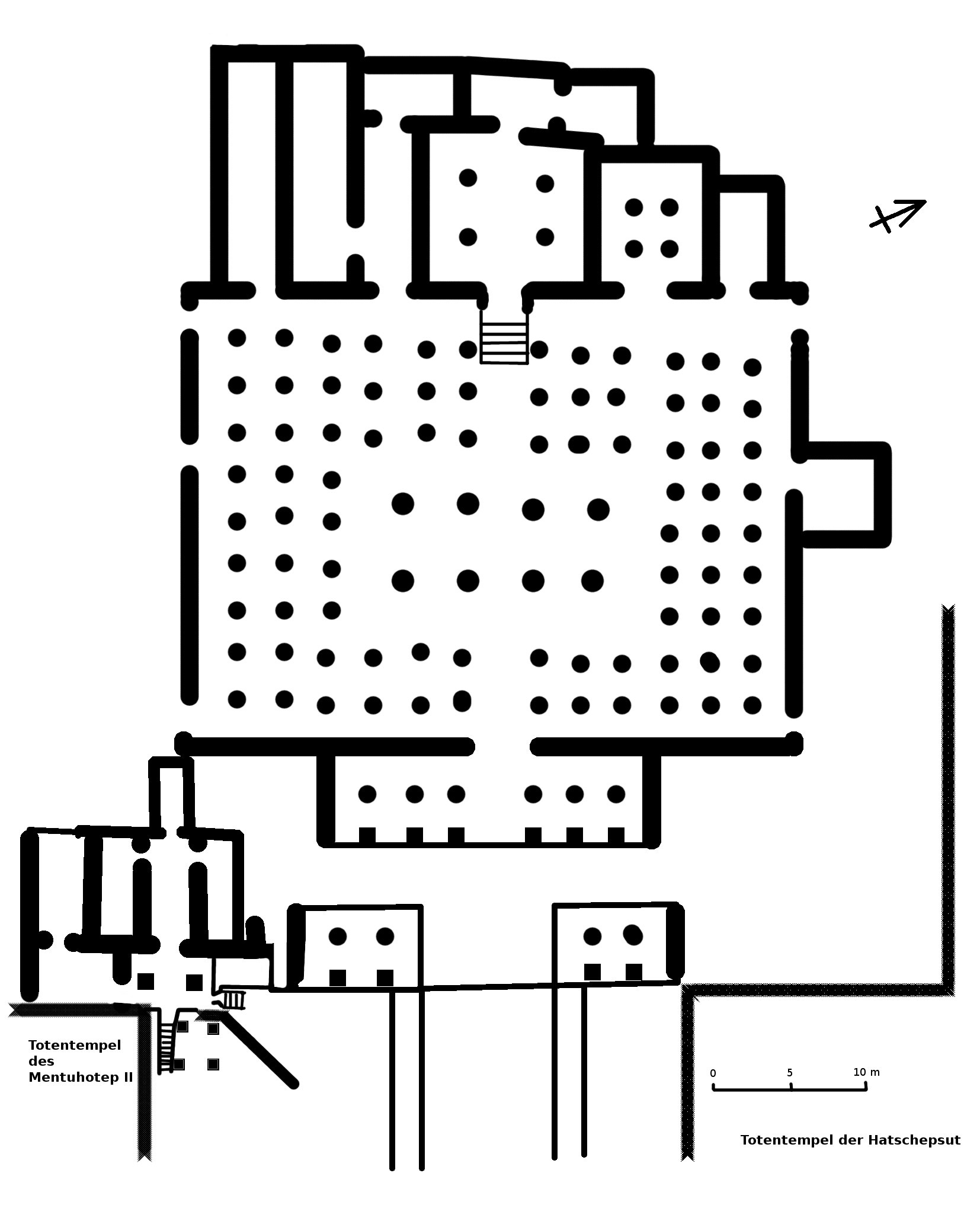 Plan des Totentempels des Thutmosis III in Deir el-Bahari nach J. Lipinska, vgl. Lipinska, Deir el-Bahari II, 1977, S. 68